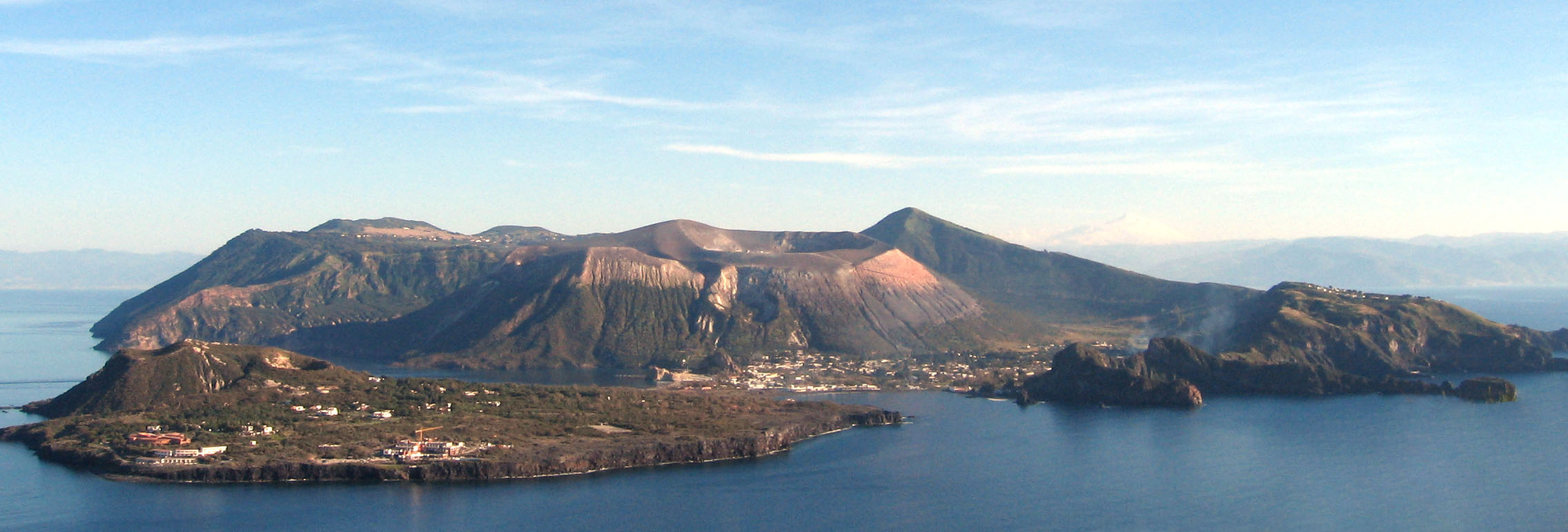 Vulcano Island